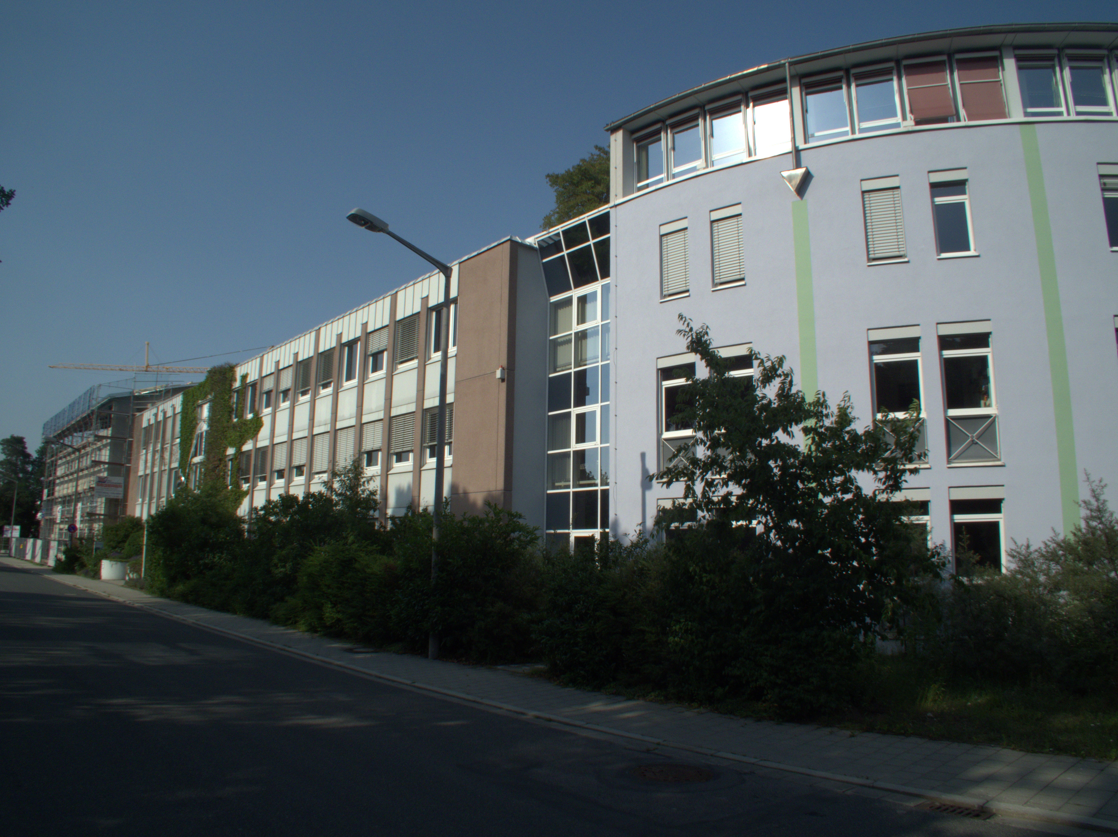 Die Zentrale des Pharma-Herstellers Bionorica in der Kerschensteiner Straße in Neumarkt